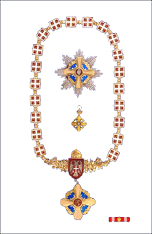 Srpski (latinica): Orden Republike Srpske